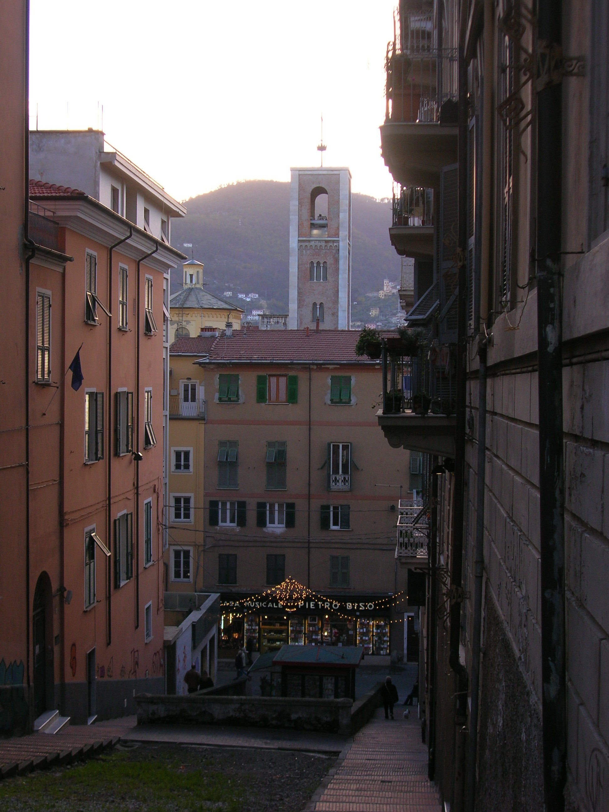 La Spezia - Vista del campanile di Santa di Maria Assunta e di via Prione da via XX settembre